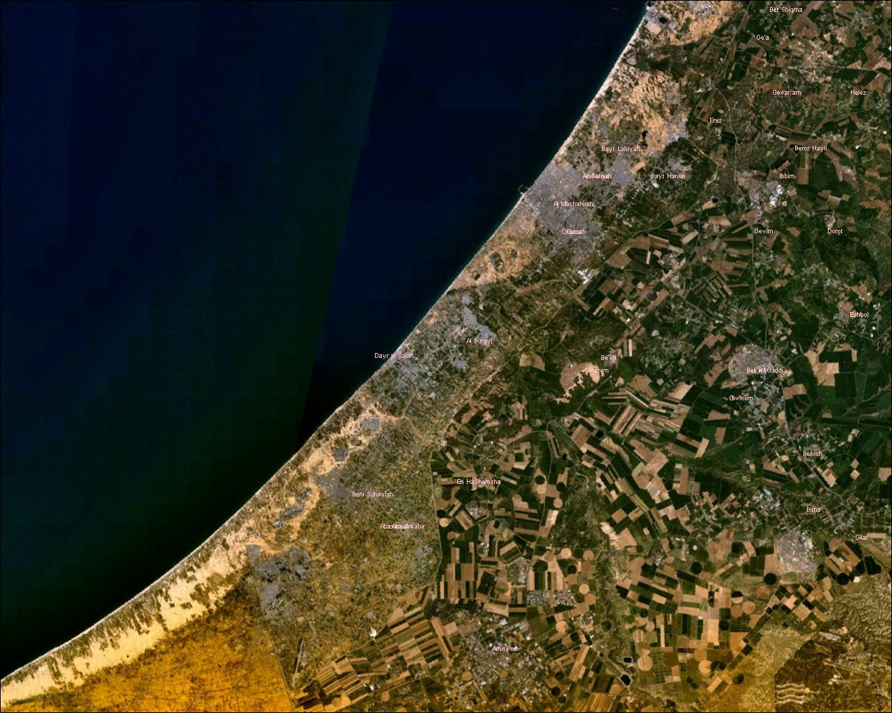 Gaza Strip